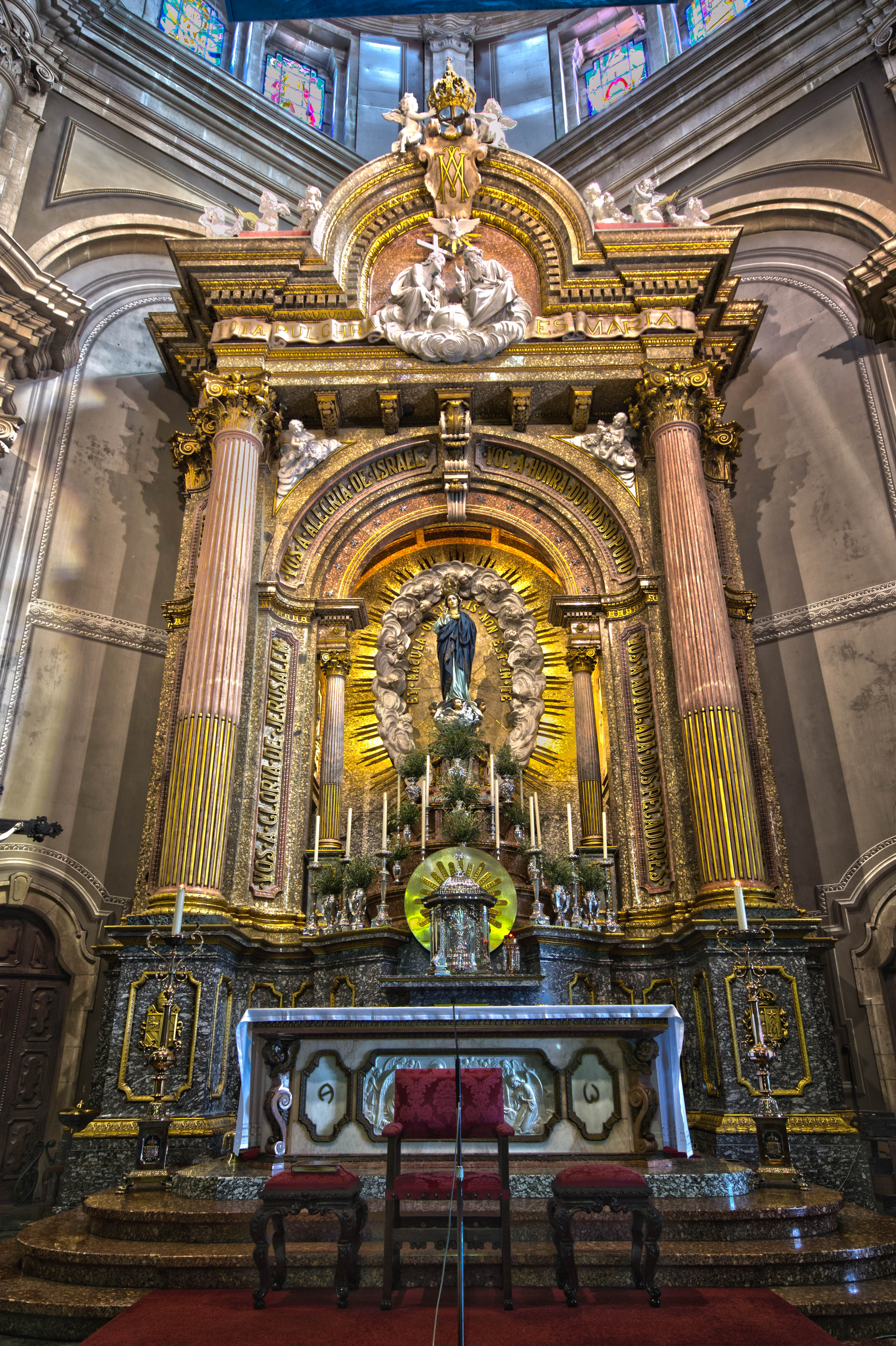 Our Mother of Sameiro Sanctuary